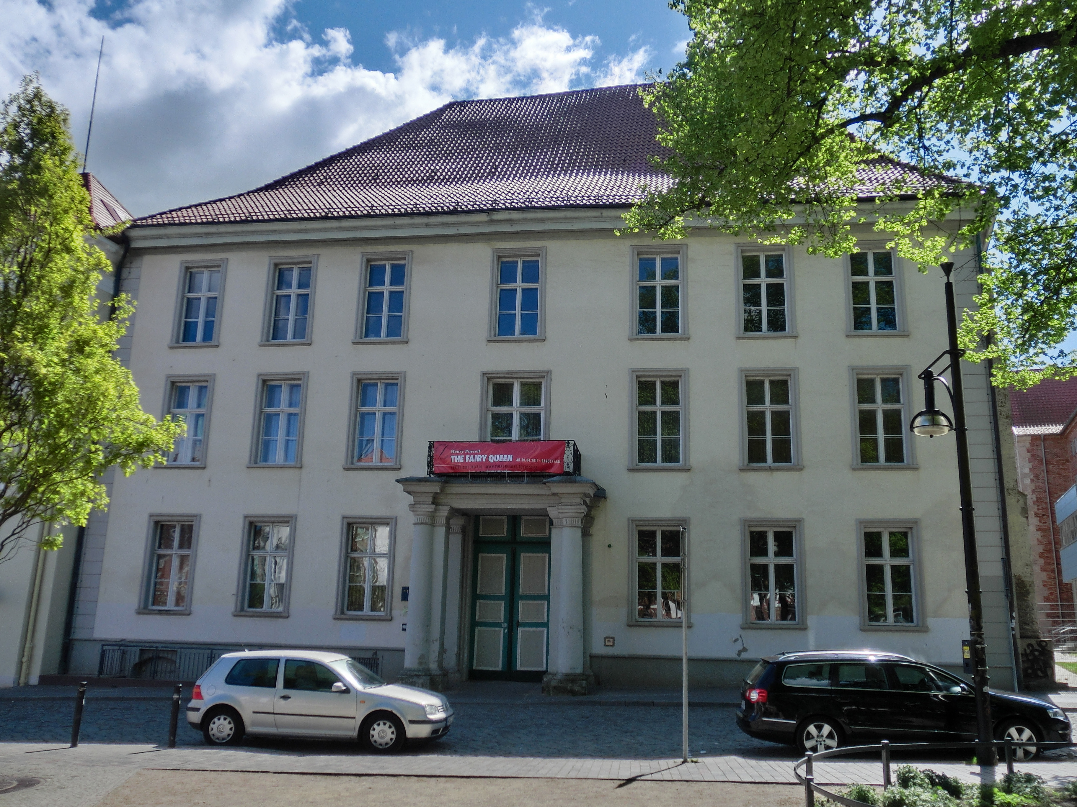 Herzogliches Palais (Baudenkmal, Rostock, Universitätsplatz 5)